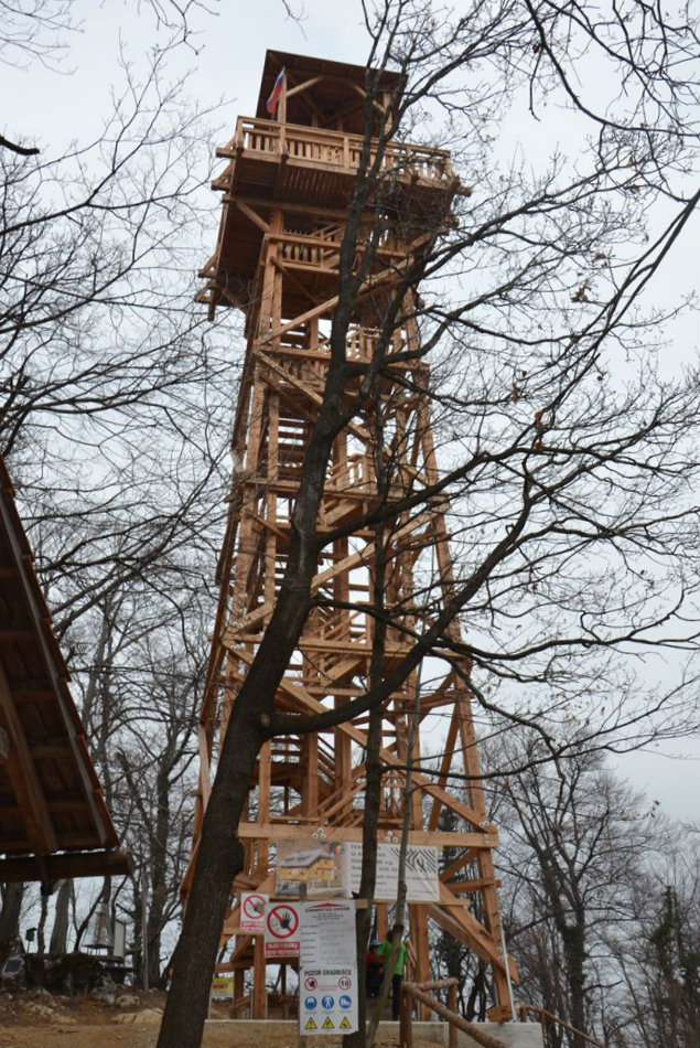 Tower of love, Žusem, Slovenia